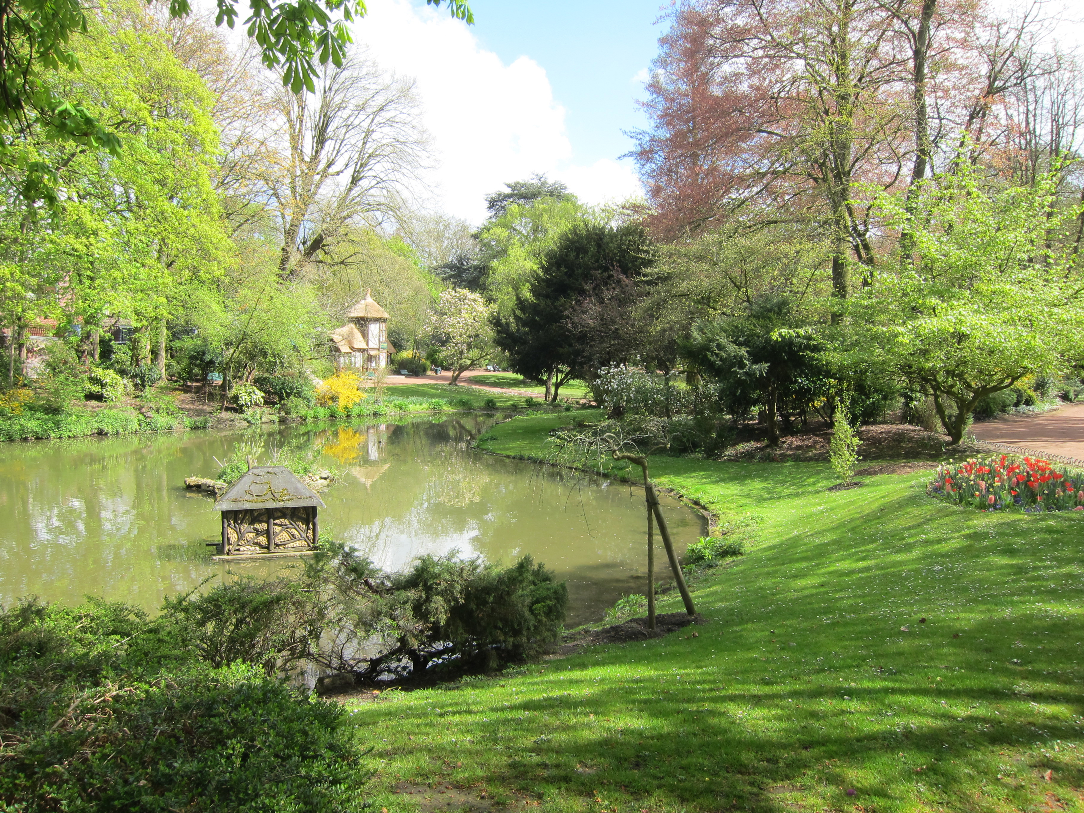 Jardin Vauban in Lille im April 2016